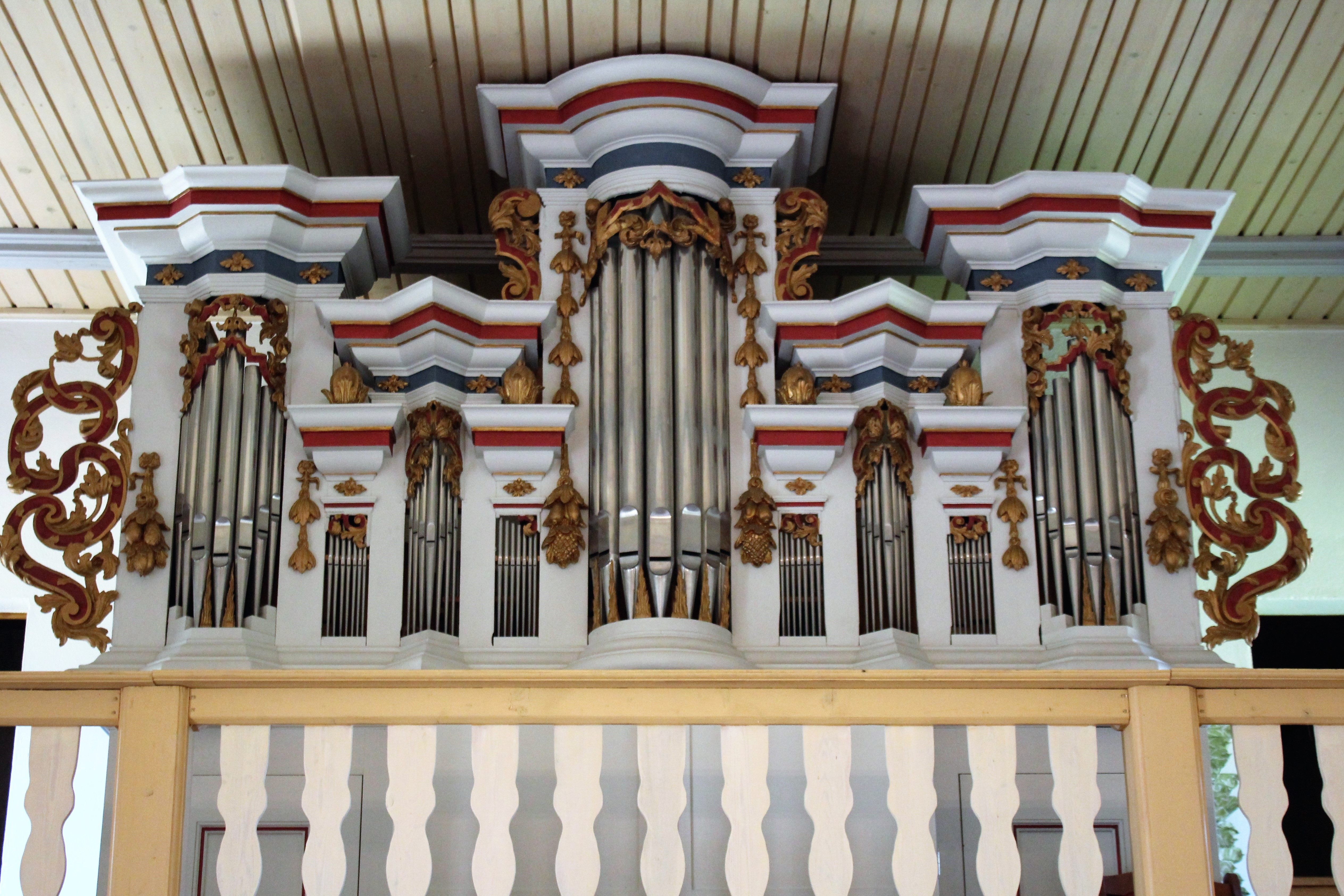 Evangelische Kirche St. Gotthardt, Rohnstedt, Großenehrich, Thüringen, Deutschland